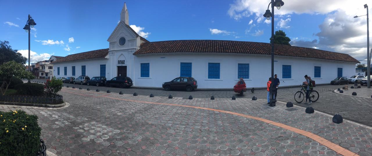 Museo ubicado al frente de la plaza San Sebastian (Cuenca-Ecuador) llamado Museo Municipal de Arte Moderno (MMAM)